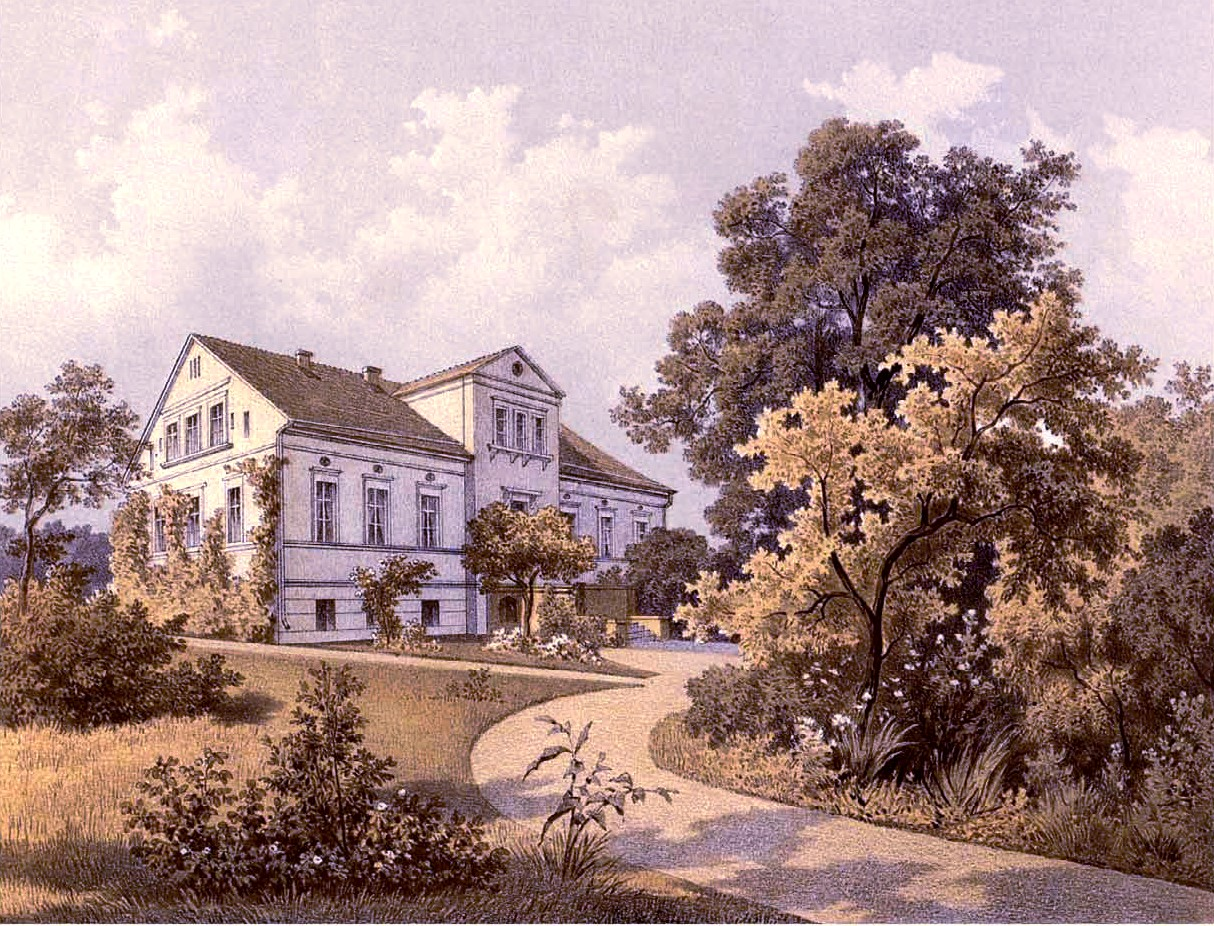 Rittergut Birkholz, Kreis Beeskow-Storkow, Provinz Brandenburg, Lithografie aus dem 19. Jahrhundert